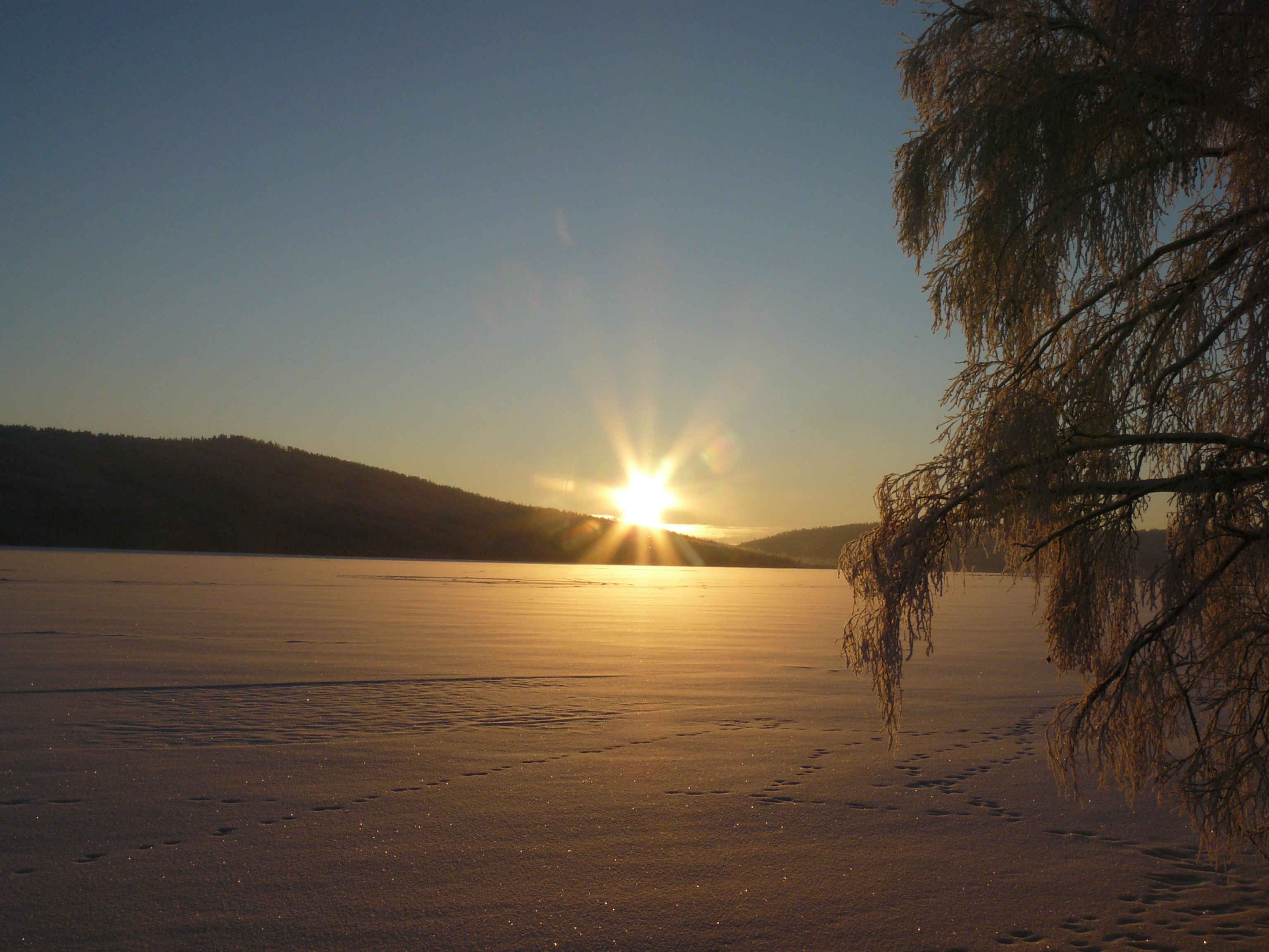 Азас заповедник, Тоджинский кожуун This image is related to the protected area of Russia number 1700045